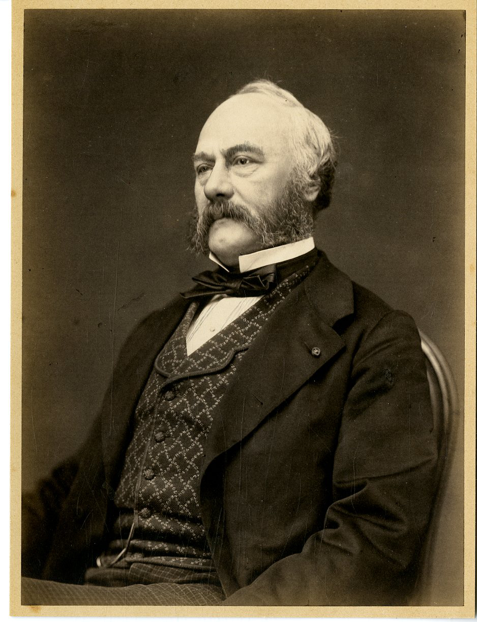 Symphorien Boittelle, préfet de police, vers 1860. Photographie de Pierre Petit.